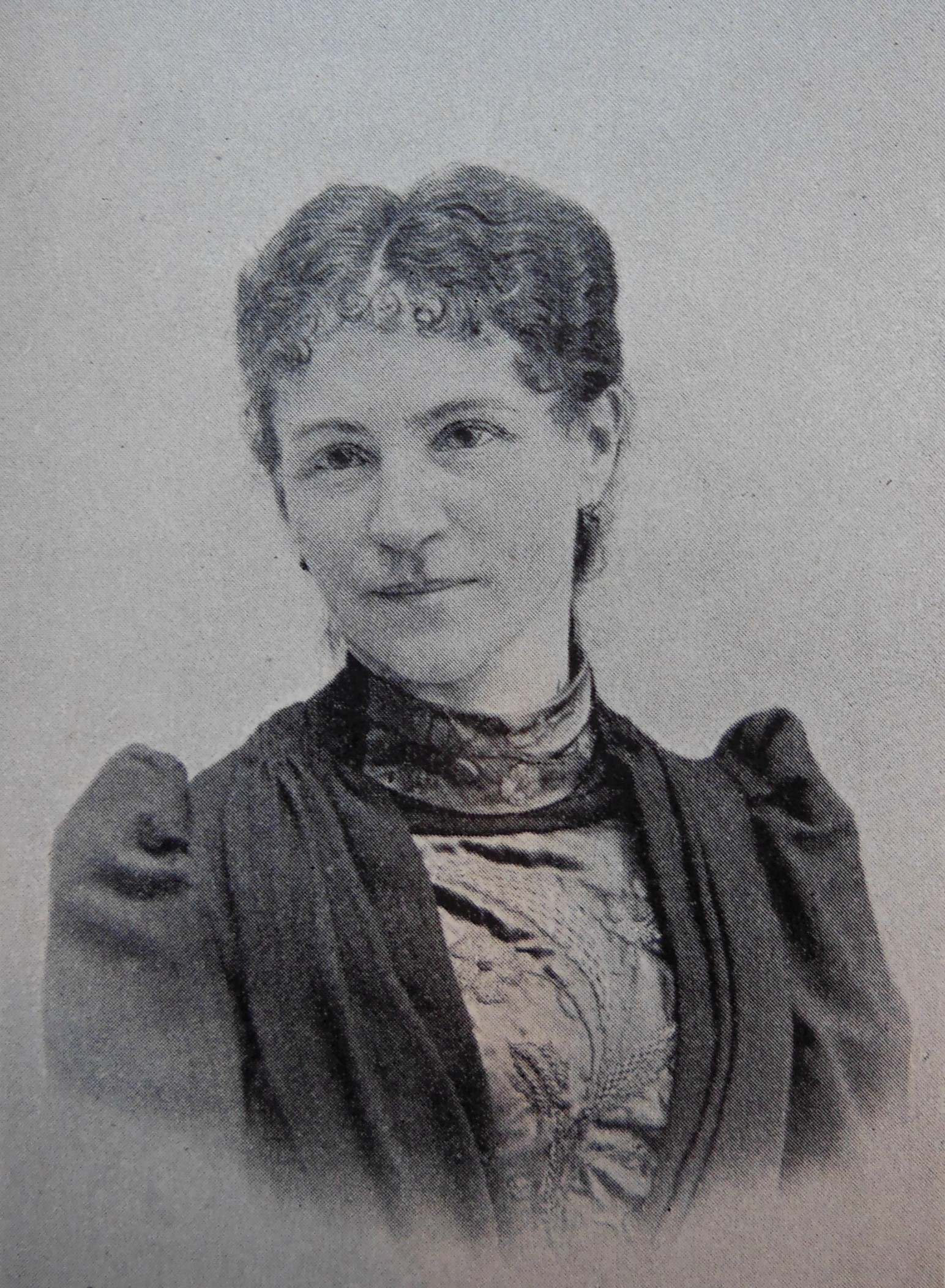 Niederbayerische Dialektdichterin